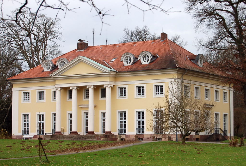 Hofgeismar - Schlösschen Schönburg (Montcherie)